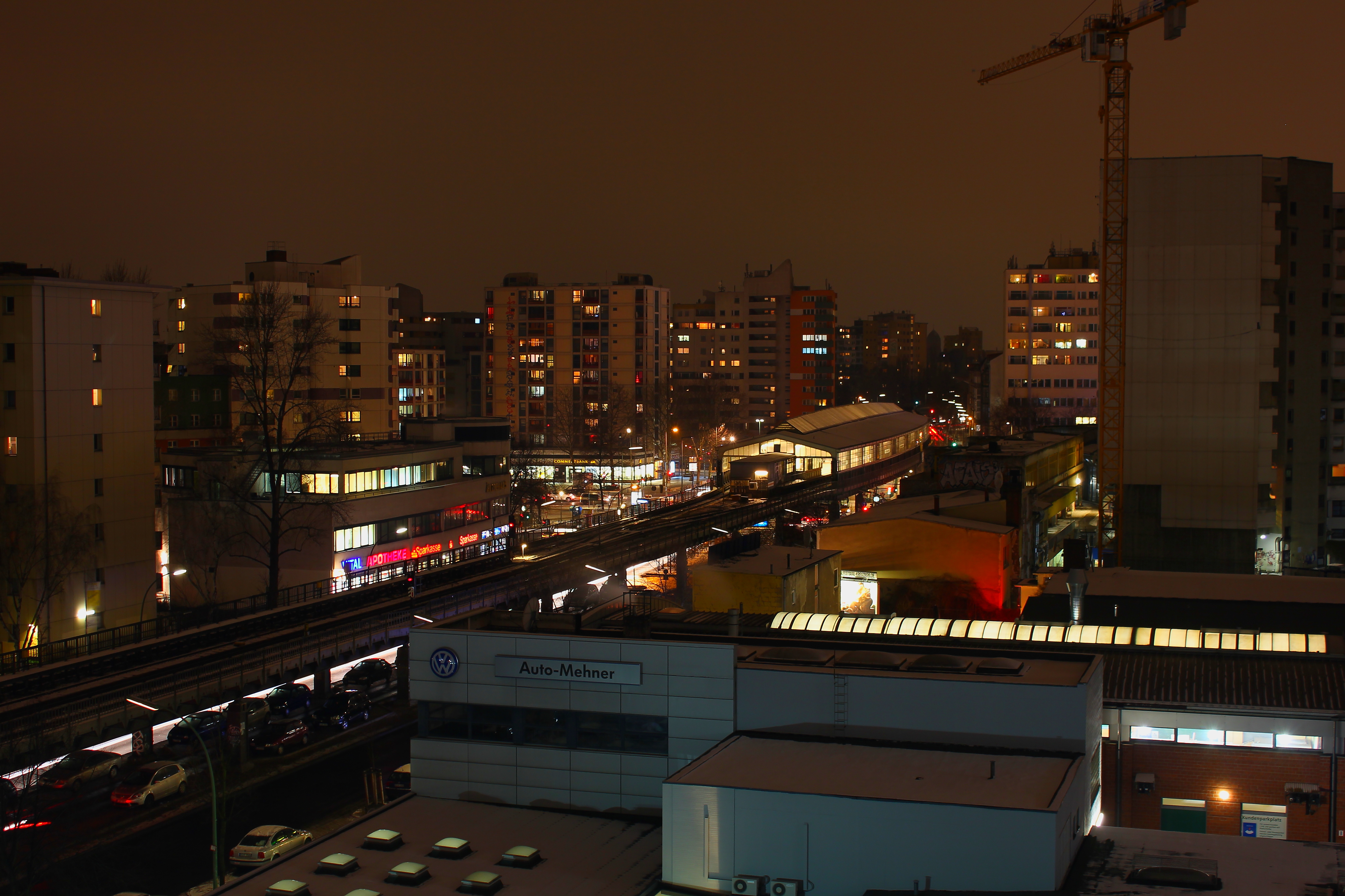 Blick auf den U-Bahnhof Kottbusser Tor (Berlin) bei Nacht